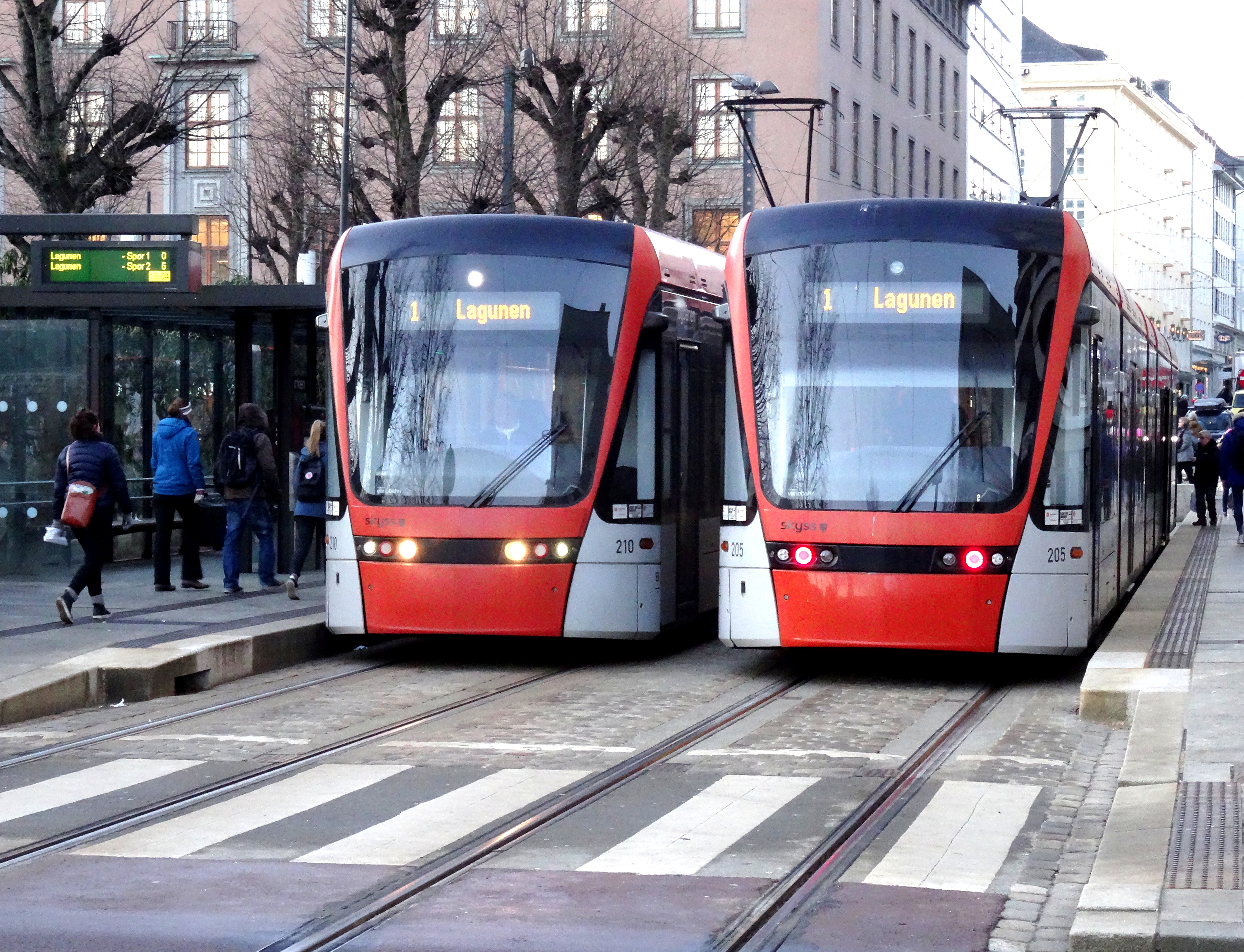 Bergen light rail / tram Byparken